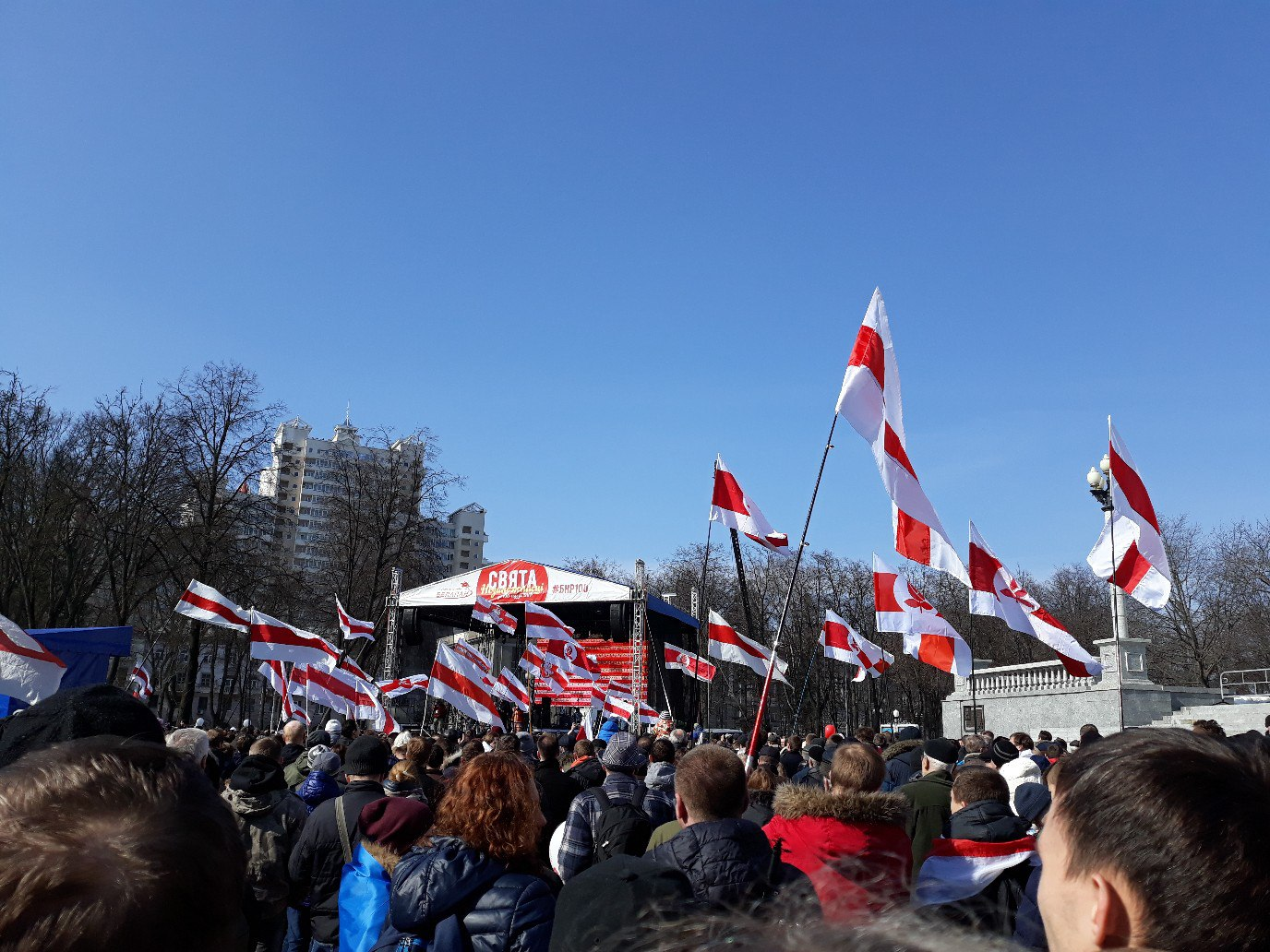 Святочны канцэр БНР100